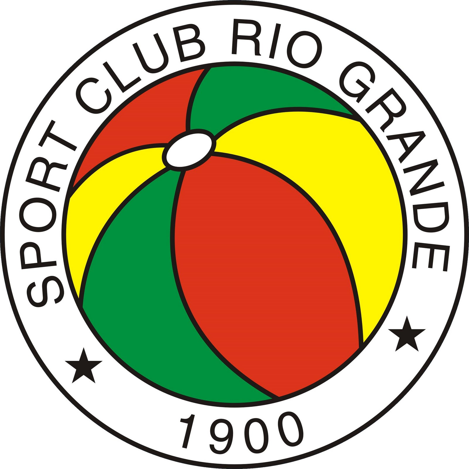 sport club rio grande